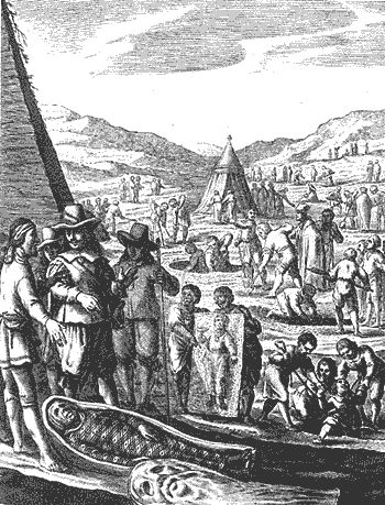 Kupferstich aus Pietro Della Valle: Reiß-Beschreibung in unterschiedliche Theile der Welt, Genf 1674, phantasievoller aber nicht authentischer Stich vom Funde zweier Mumien